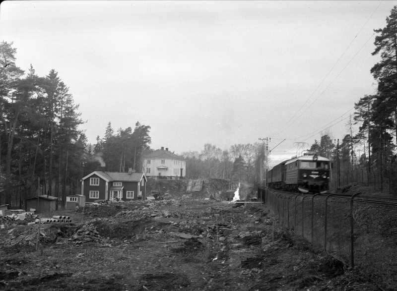 Anleggsstart for Drammensveien ved Frantzebråten i Oslo, 29. september 1955